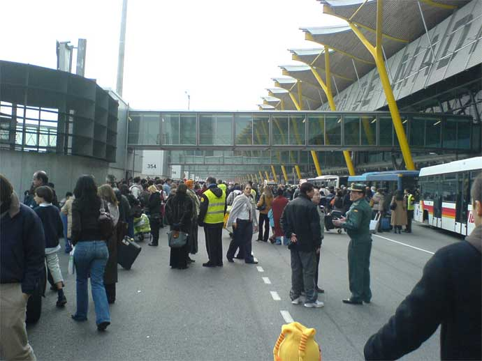 El desconcierto y el nerviosismo se apoderó de los pasajeros de la T4.